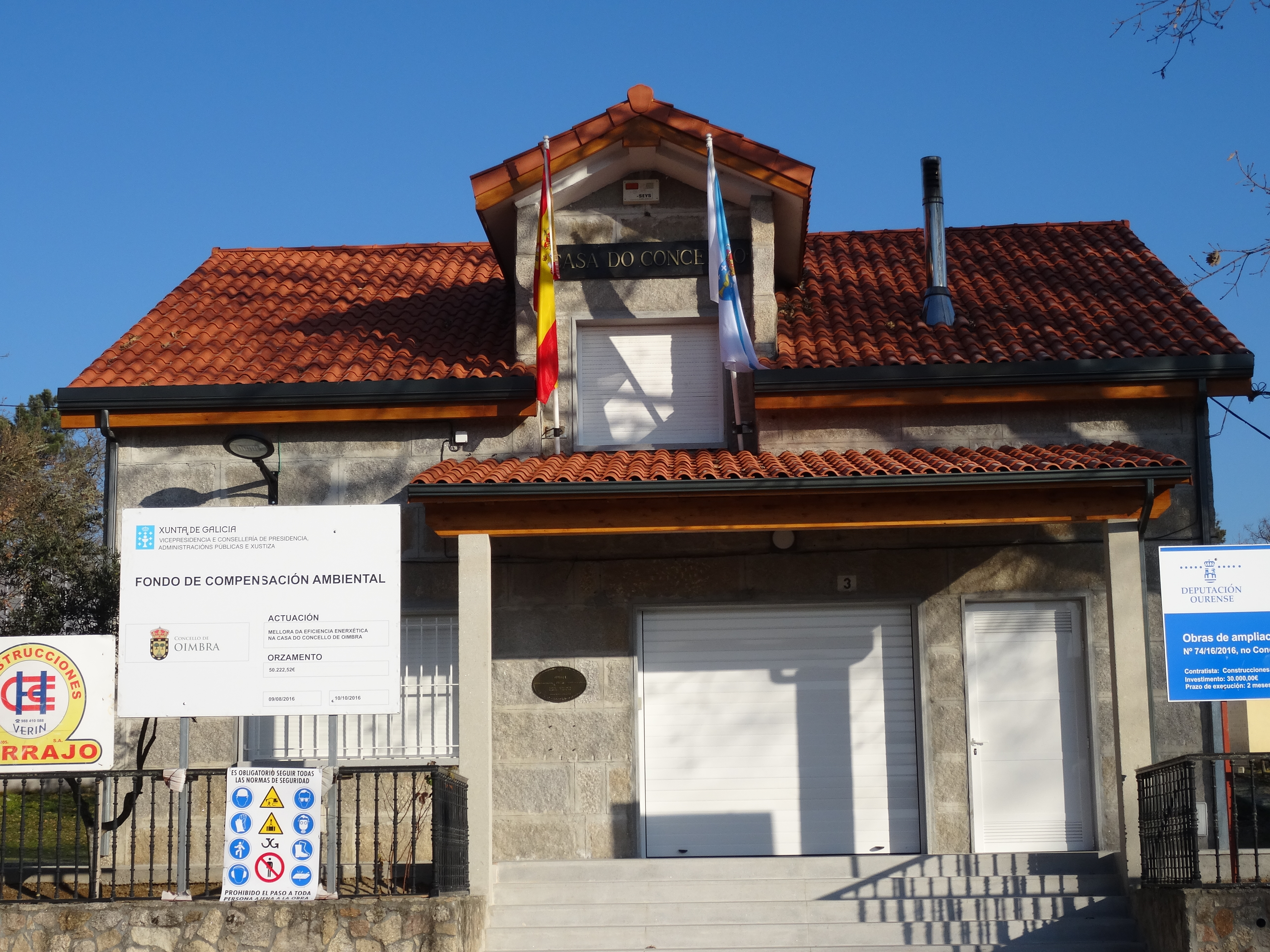 Ver título